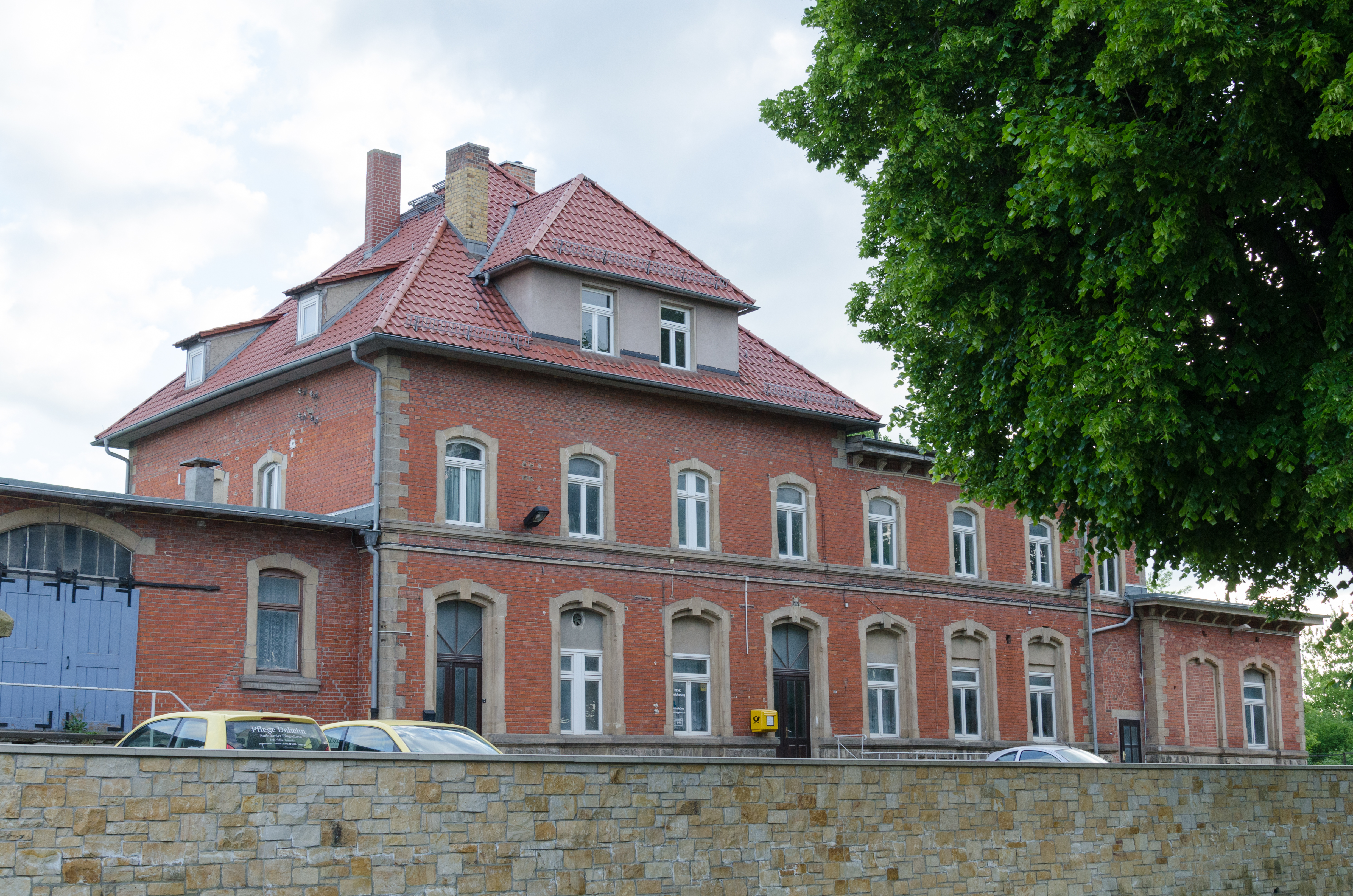 Laucha an der Unstrut, Bahnhofstraße, Bahnhof